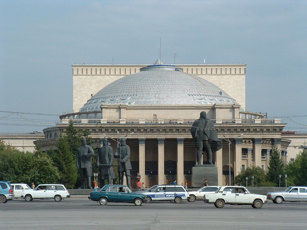 Novosibirsk Opera House